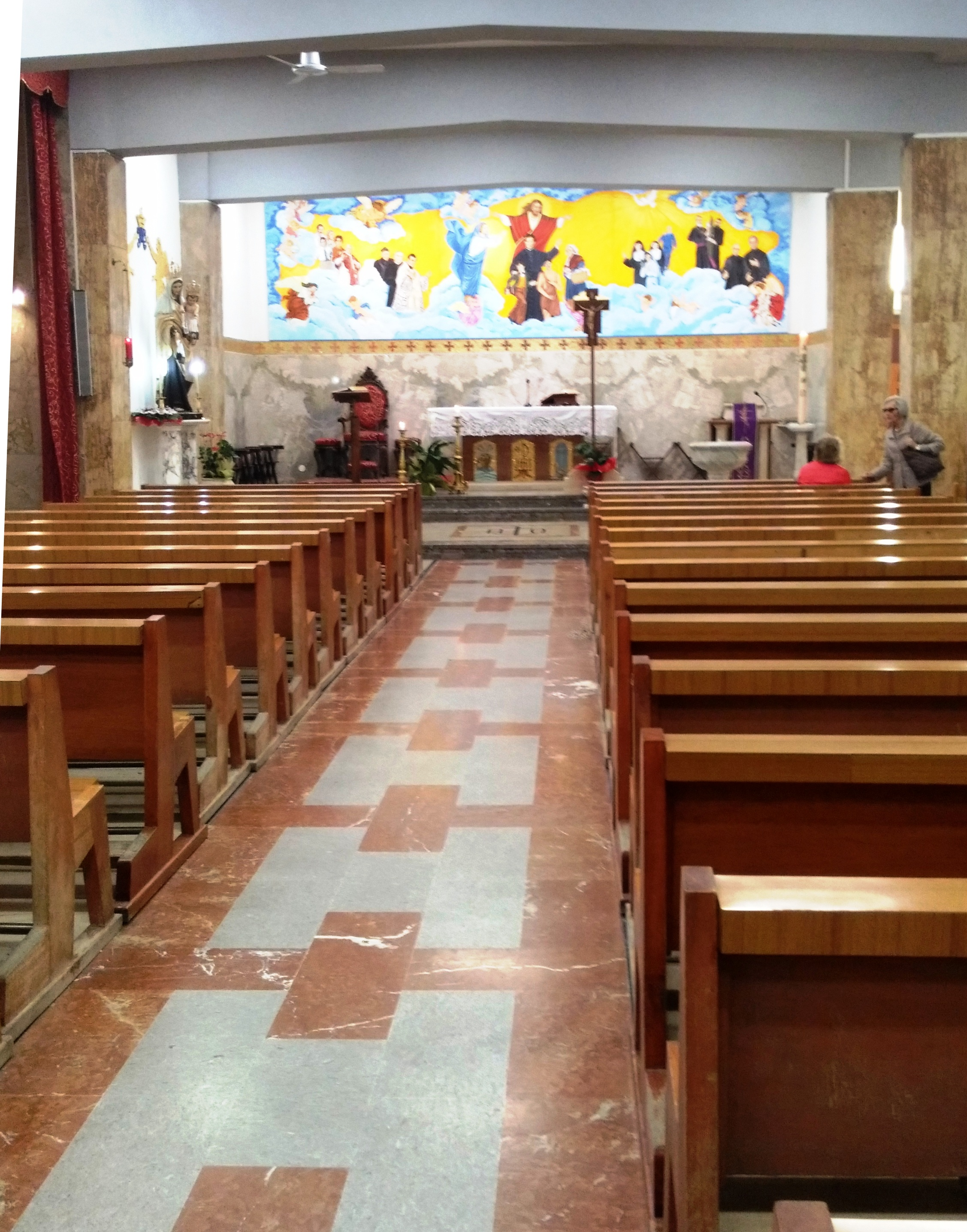 La cripta